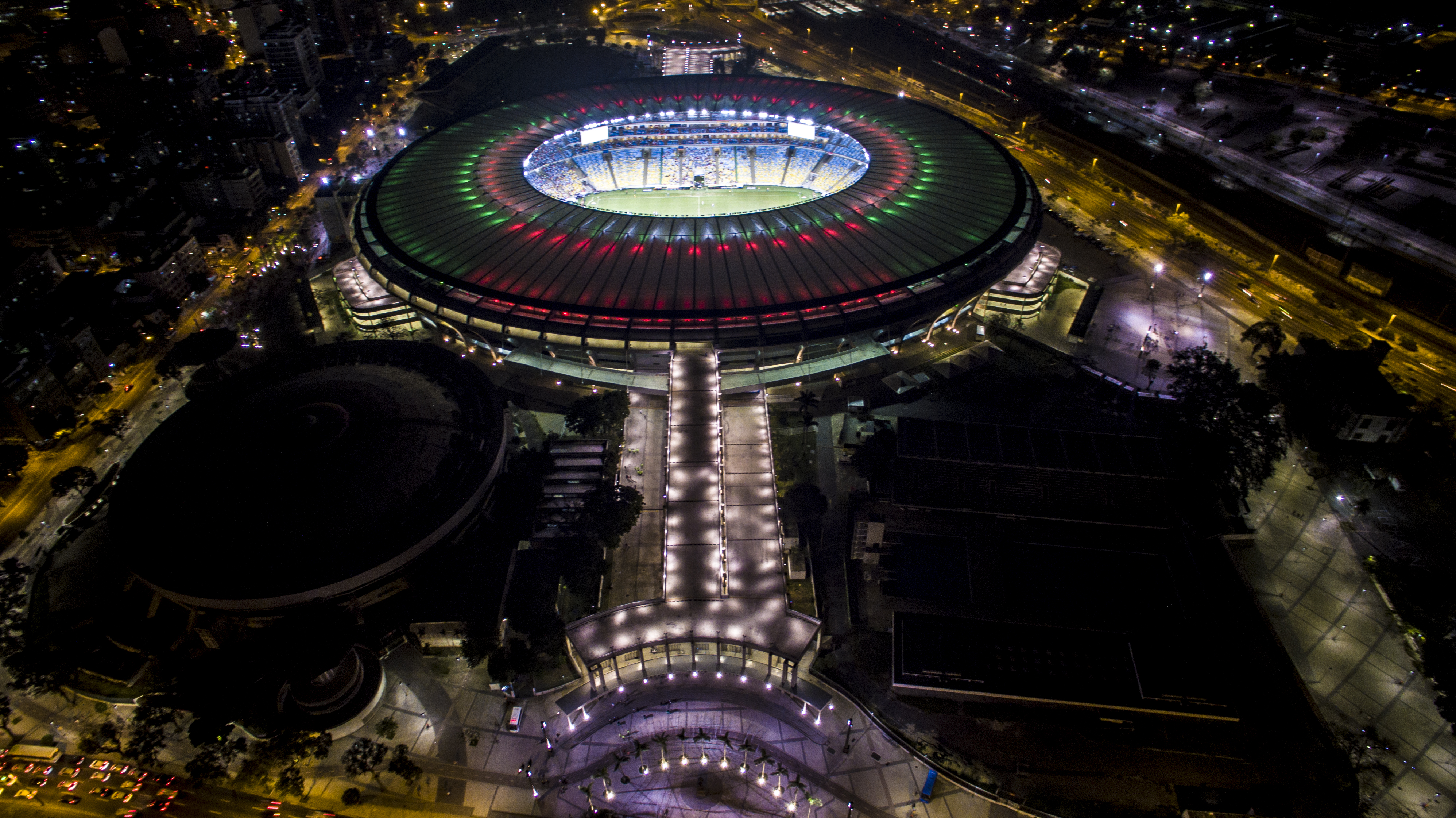 Foto Tirada do Estadio do Maracanã a Noite